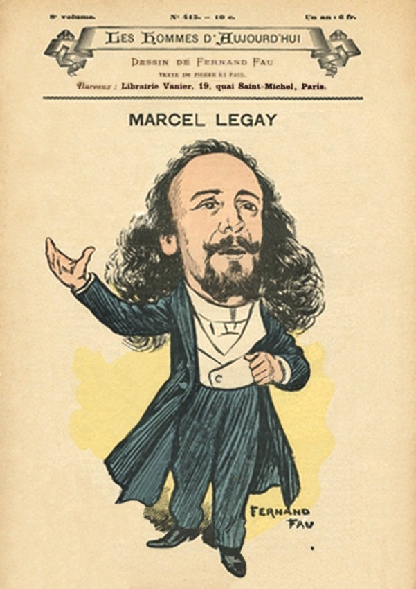 Caricature de Marcel Legay par Fernand Fau